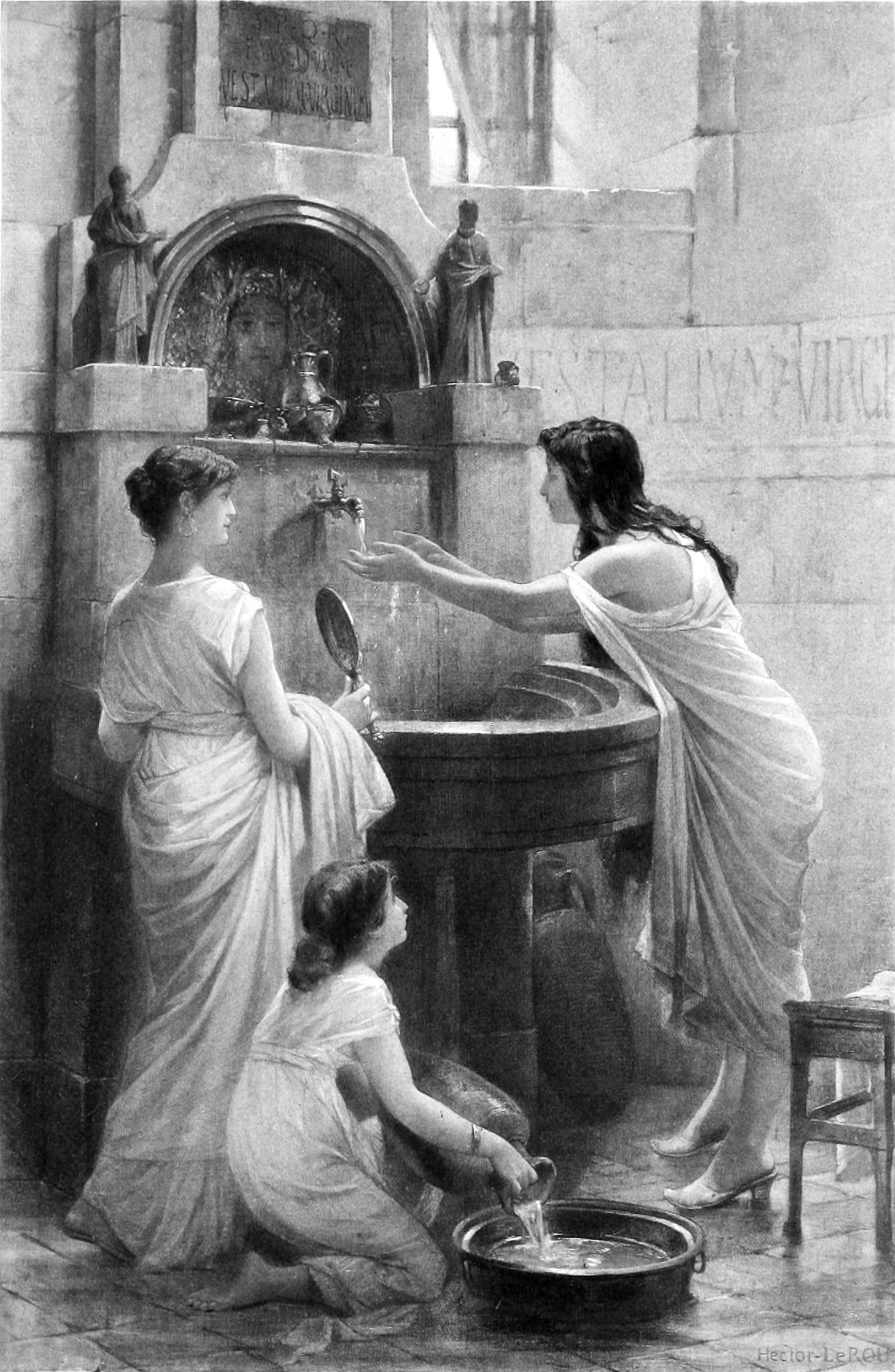 Sacrarium